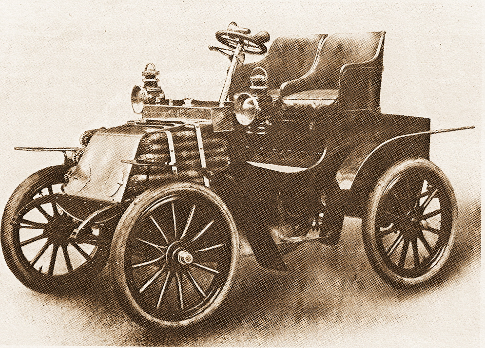 1900 Roots 5 hp